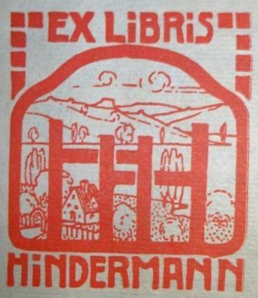 Frühes Exlibris des Schweizer Architekten Hans Hindermann, Holzschnitt von Max Bucherer (1883–1974), 1906